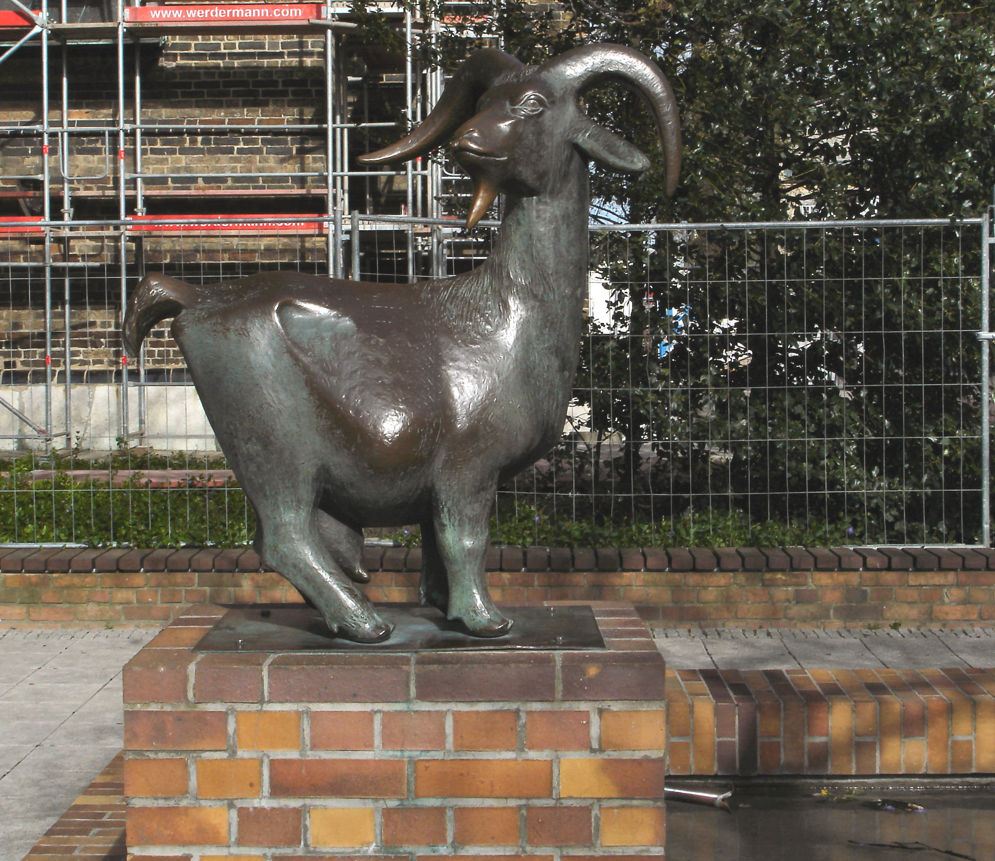 Bronzefigur "Afrikanische Bergziege" von Gerhard Rommel in Rostock / Sculpture "African Mountain Goat" of Gerhard Rommel in Rostock